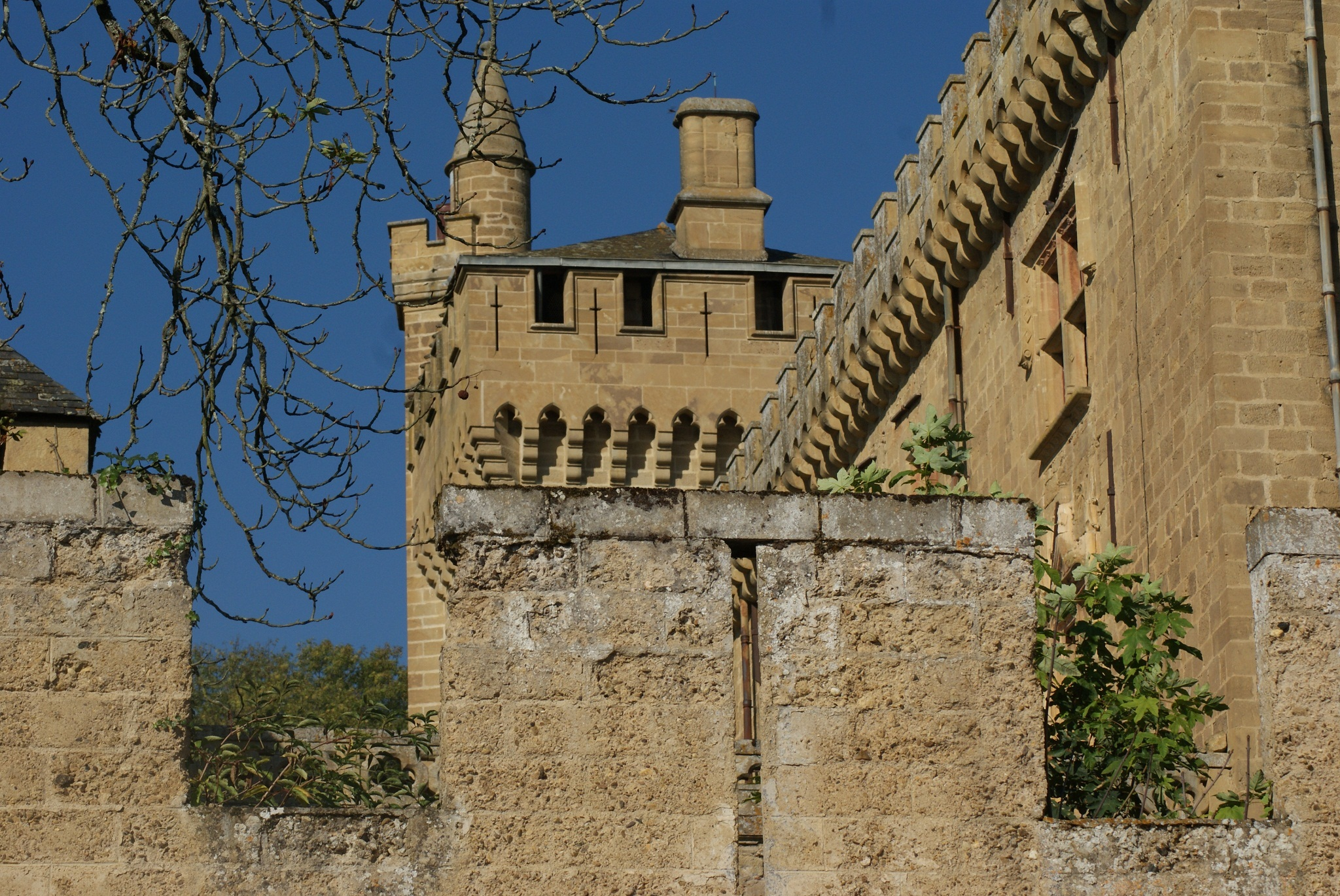 Het donjon.